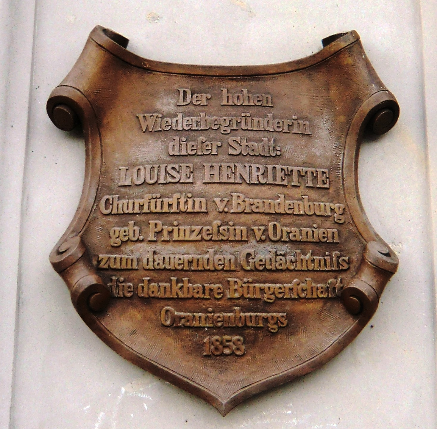 Dankschrift der Bürger Oranienburgs auf dem Denkmal der Luise Henriette von Oranien vor dem Schloss Oranienburg.